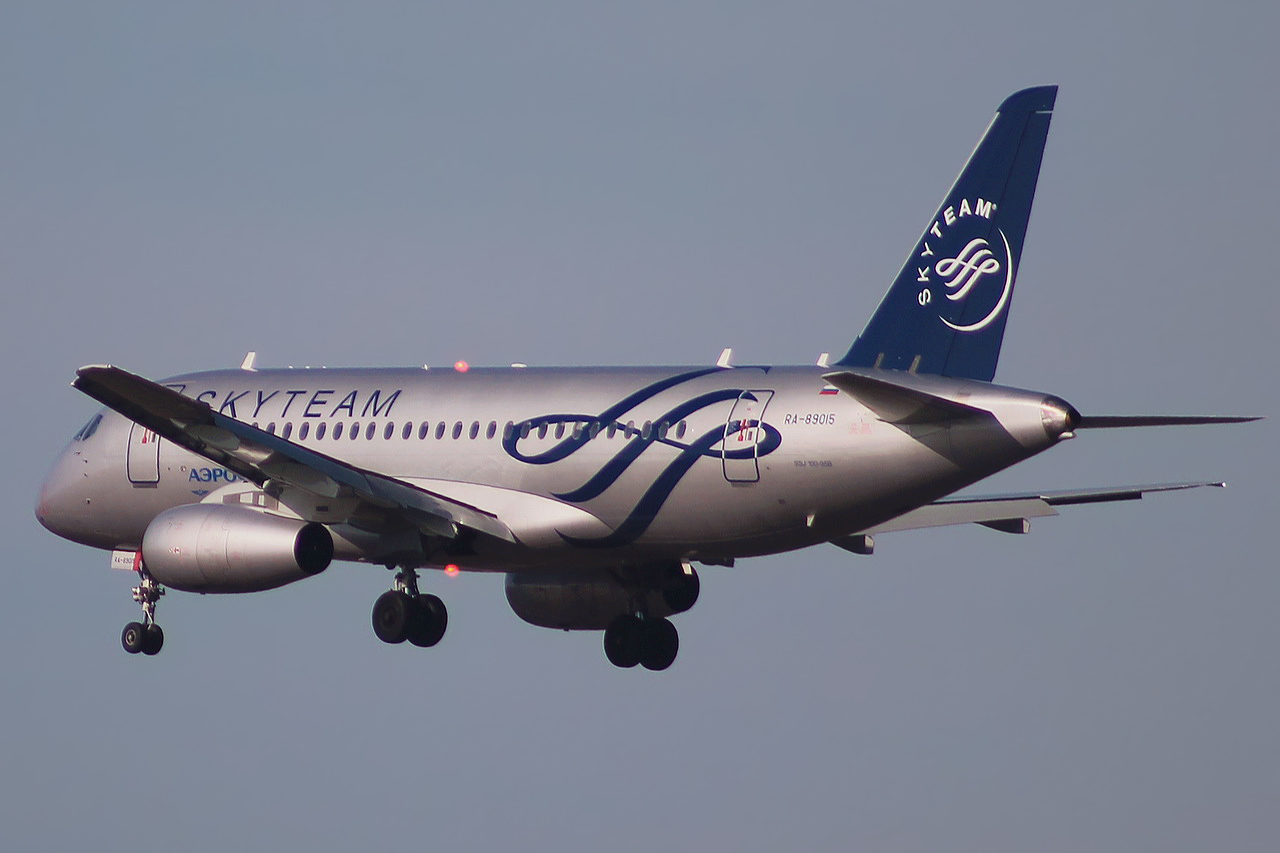 Сухой Суперджет 100 в ливрее Skyteam